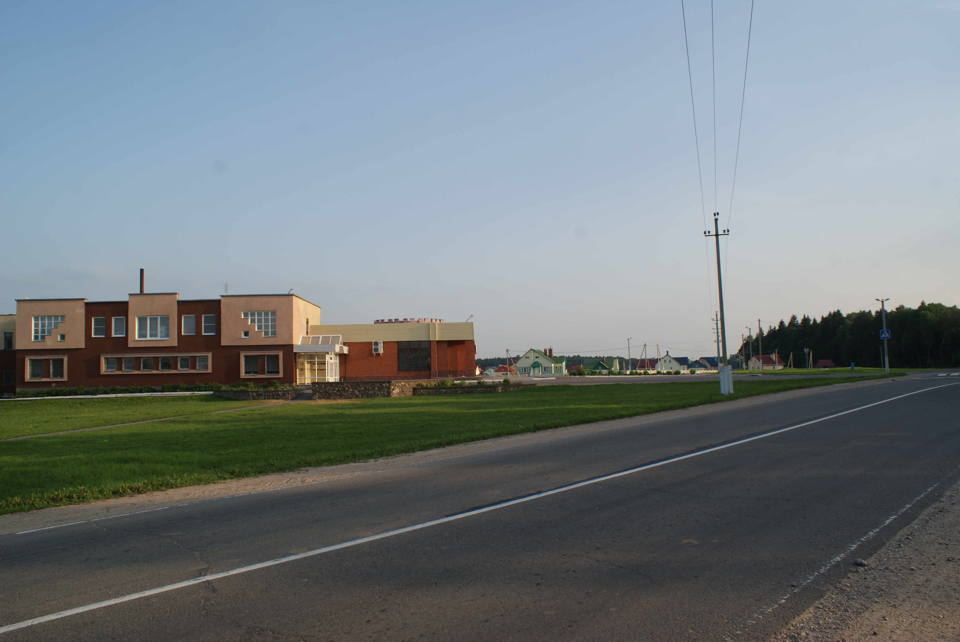 Старыца be:Капыльскі раён